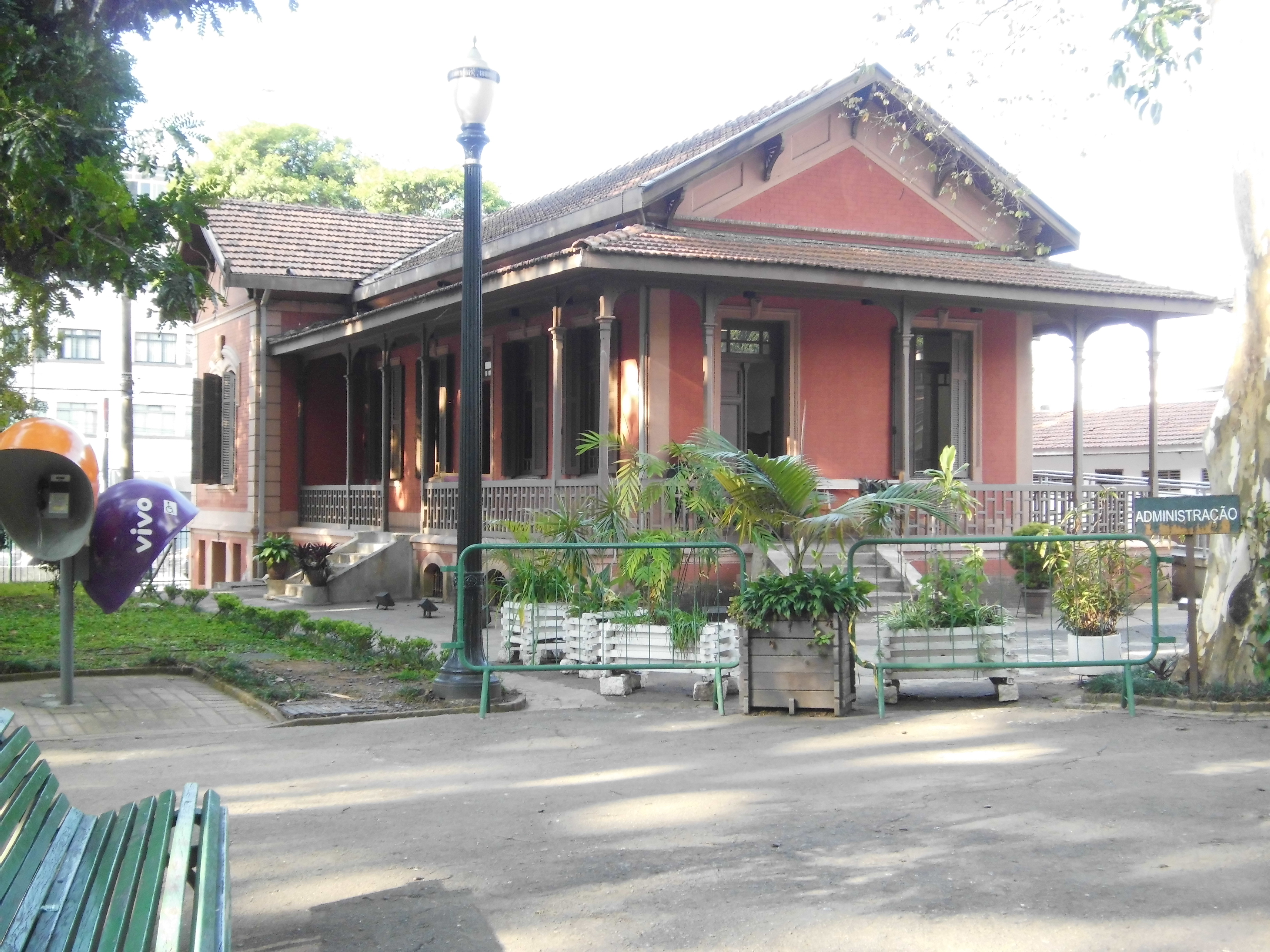 Prédio da administração do parque Jardim da Luz (São Paulo-SP, Brasil).